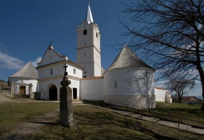 A kézdiszentléleki vártemplom.